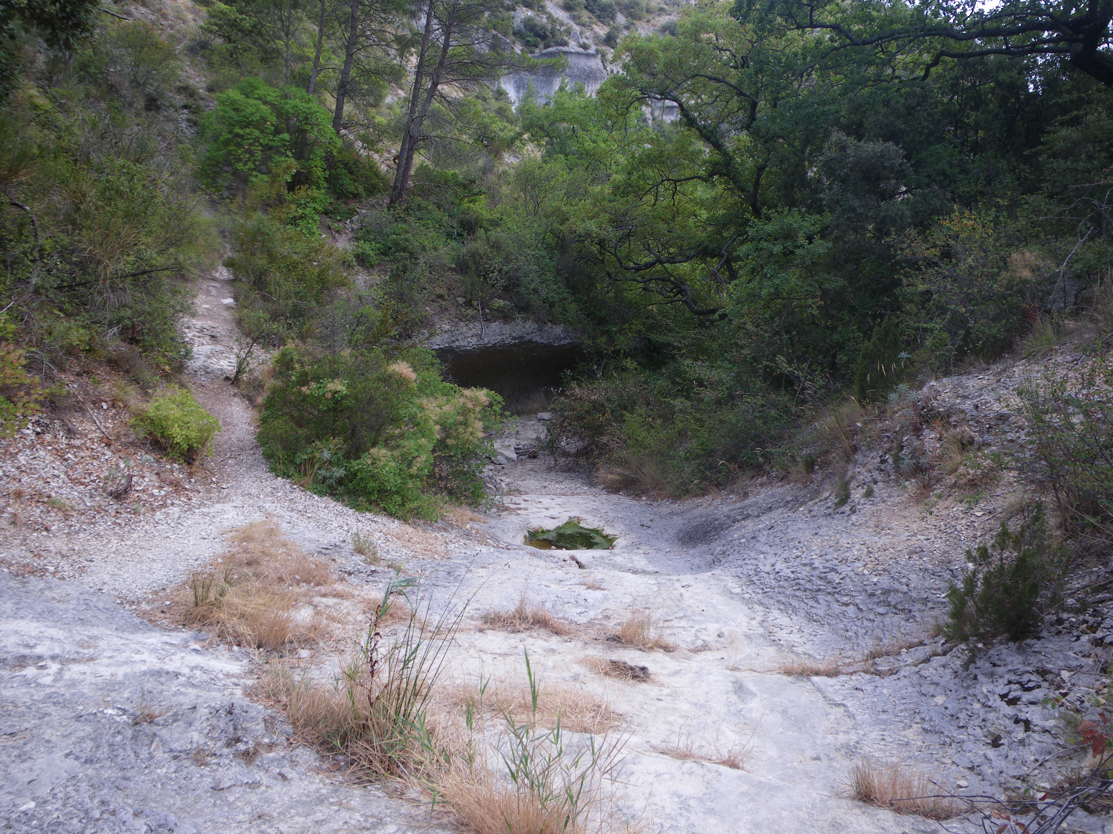 Sénancole entre Sénanque et le Village de Bories